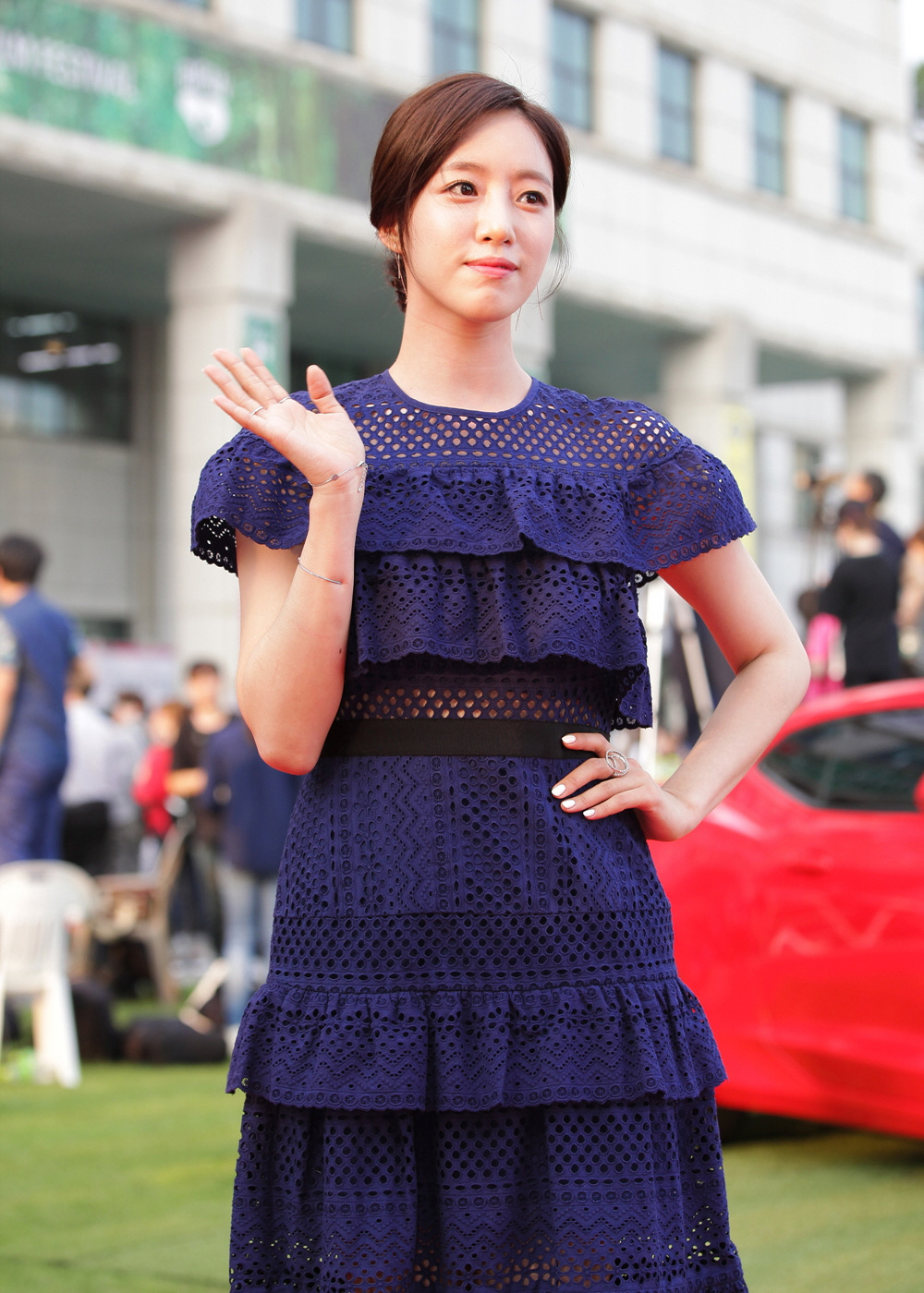 2017 부천국제판타스틱영화제(BIFAN) 레드카펫